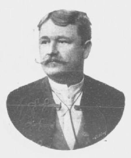 Josef Staroštík (1862-1929), rakouský a český politik